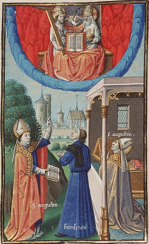 Buchmalerei aus Augustinus' "Gottesstaat" von Maître François, um 1475-1480: Simplicianus diskutiert mit Augustinus über die Dreieinigkeit.